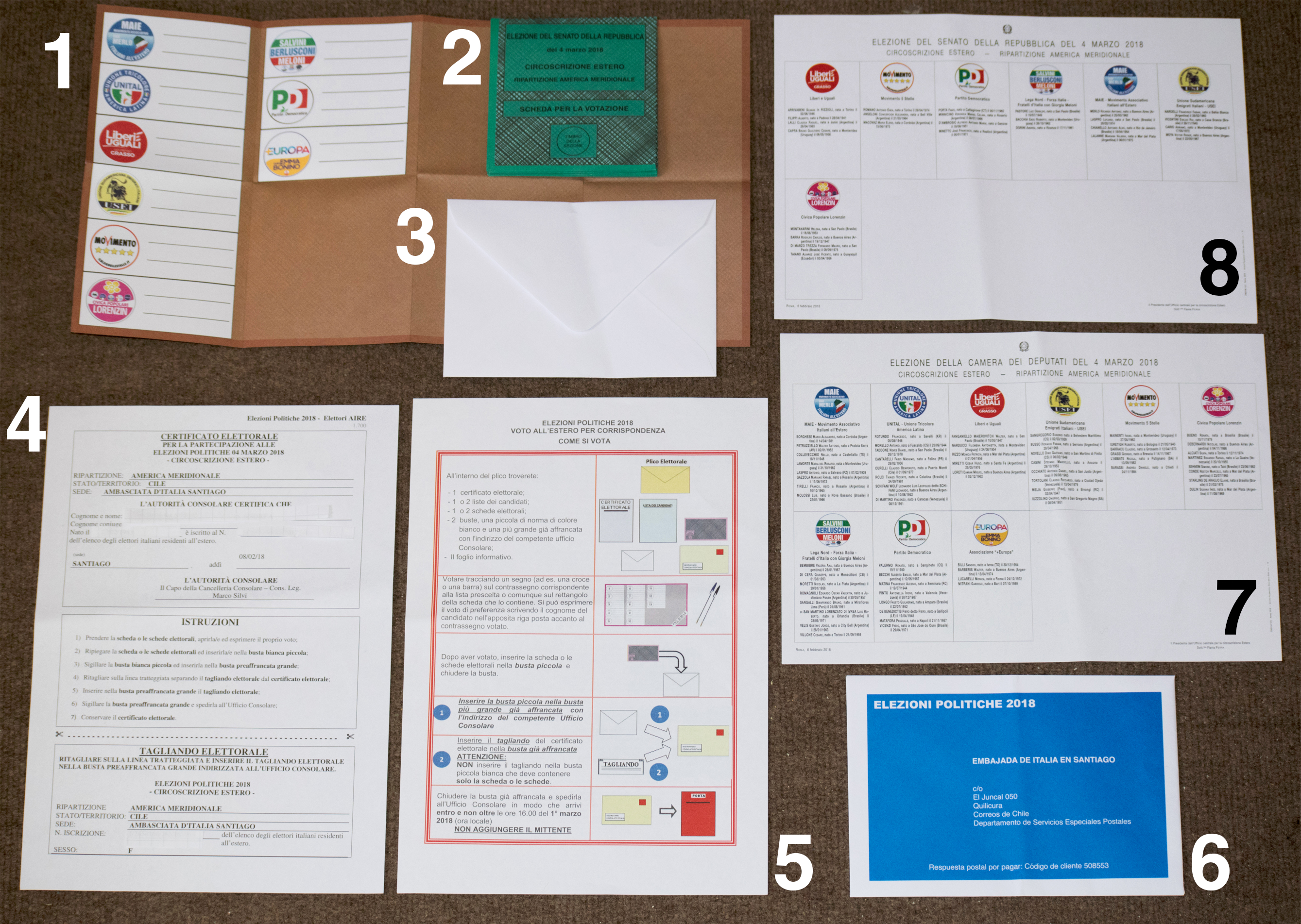 Contenuto del plico elettorale per il voto all'estero (elezioni politiche 2018).1. Scheda elettorale per la Camera dei Deputati (aperto)2. Scheda elettorale per il Senato della Repubblica (chiuso)3. Busta bianca per mantenere separate e anonime le schede4. Certificato elettorale5. Istruzioni di voto6. Busta per inviare il materiale al Consolato o Ambasciata competente7. Elenchi dei candidati della ripartizione America Meridionale per la Camera dei Deputati8. Elenchi dei candidati della ripartizione America Meridionale per il Senato della Repubblica